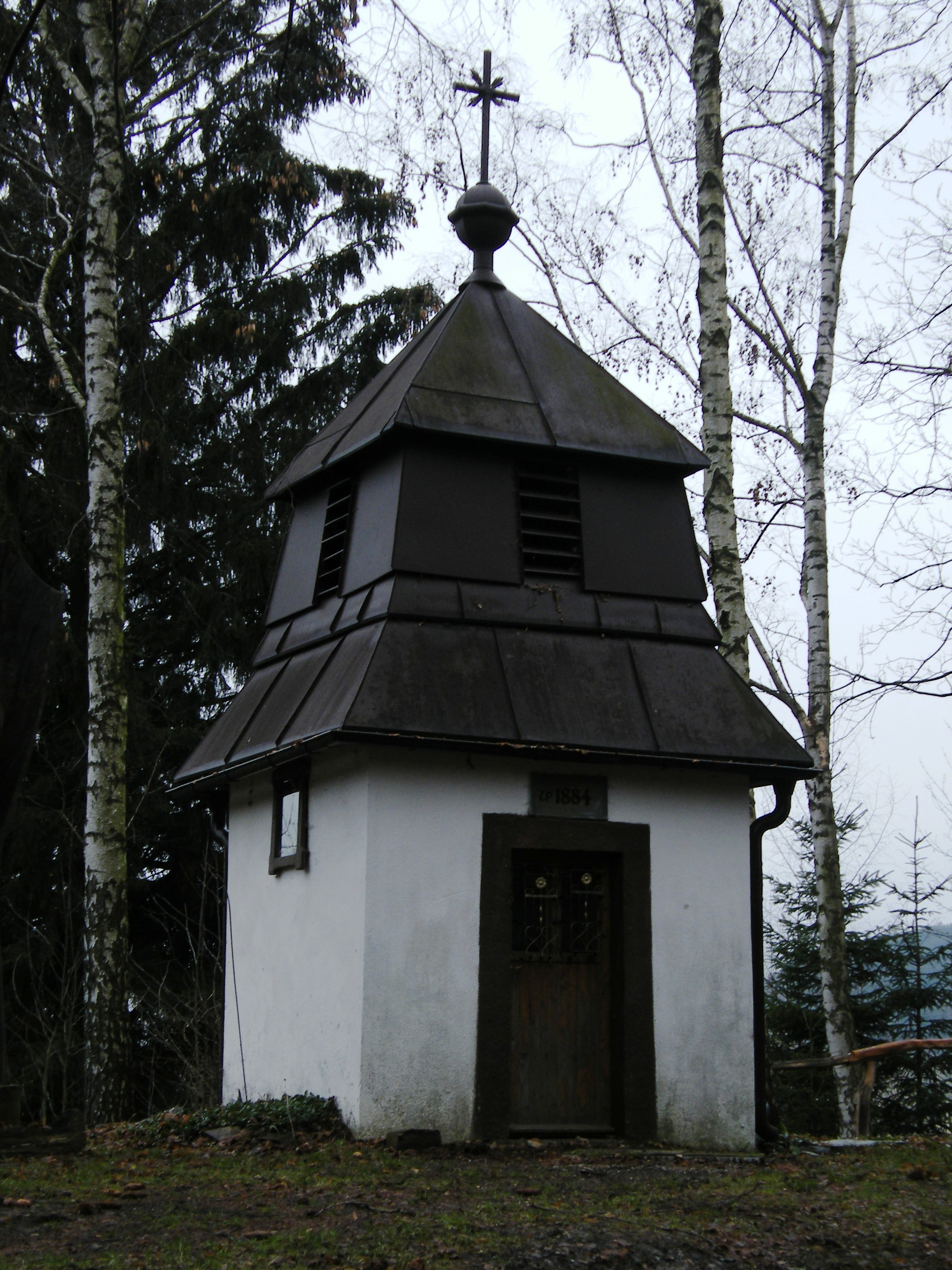 Kaple na Zvonivém vrchu (Františkov-U Hásků)